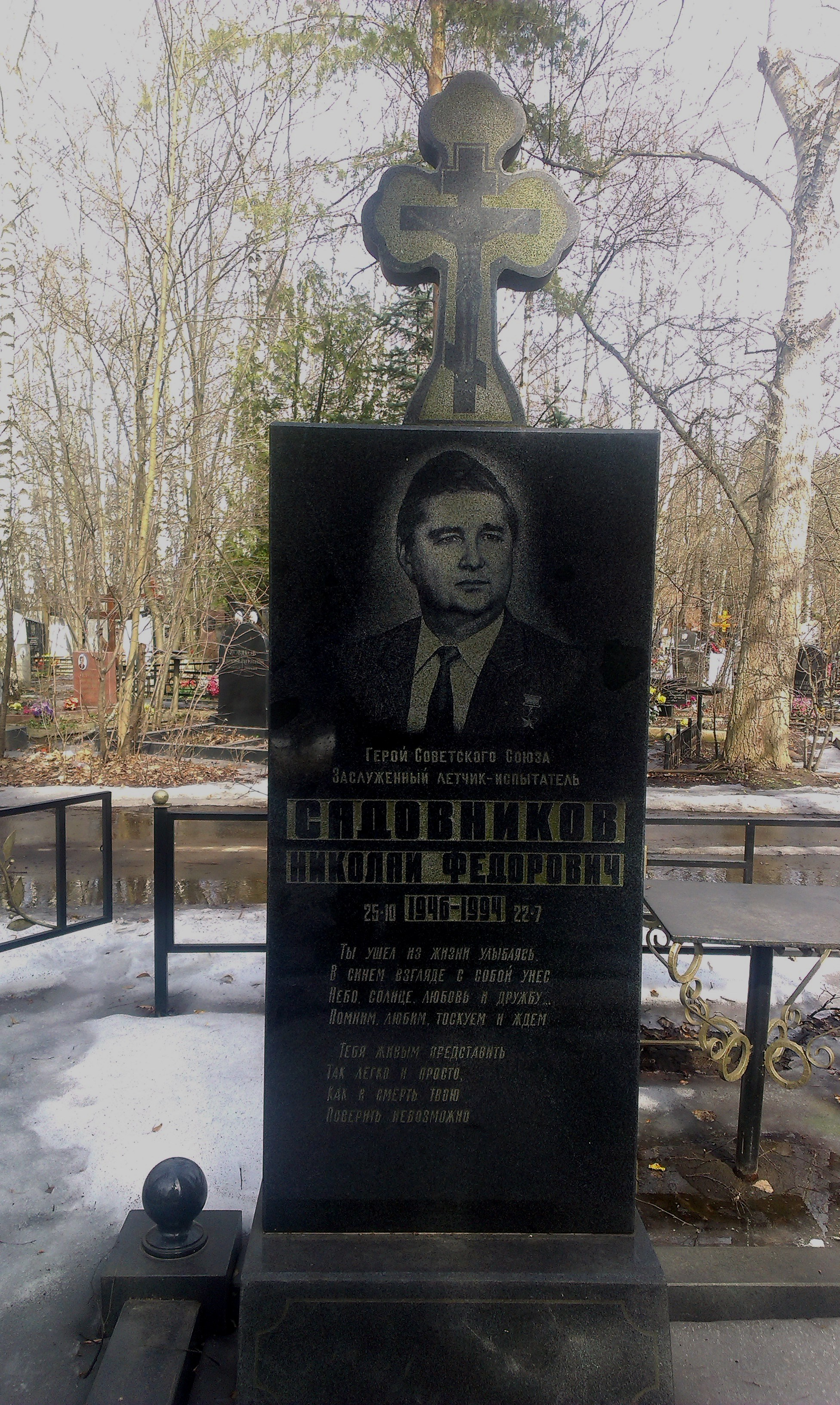 Могила Николая Садовникова. Кладбище села Островцы